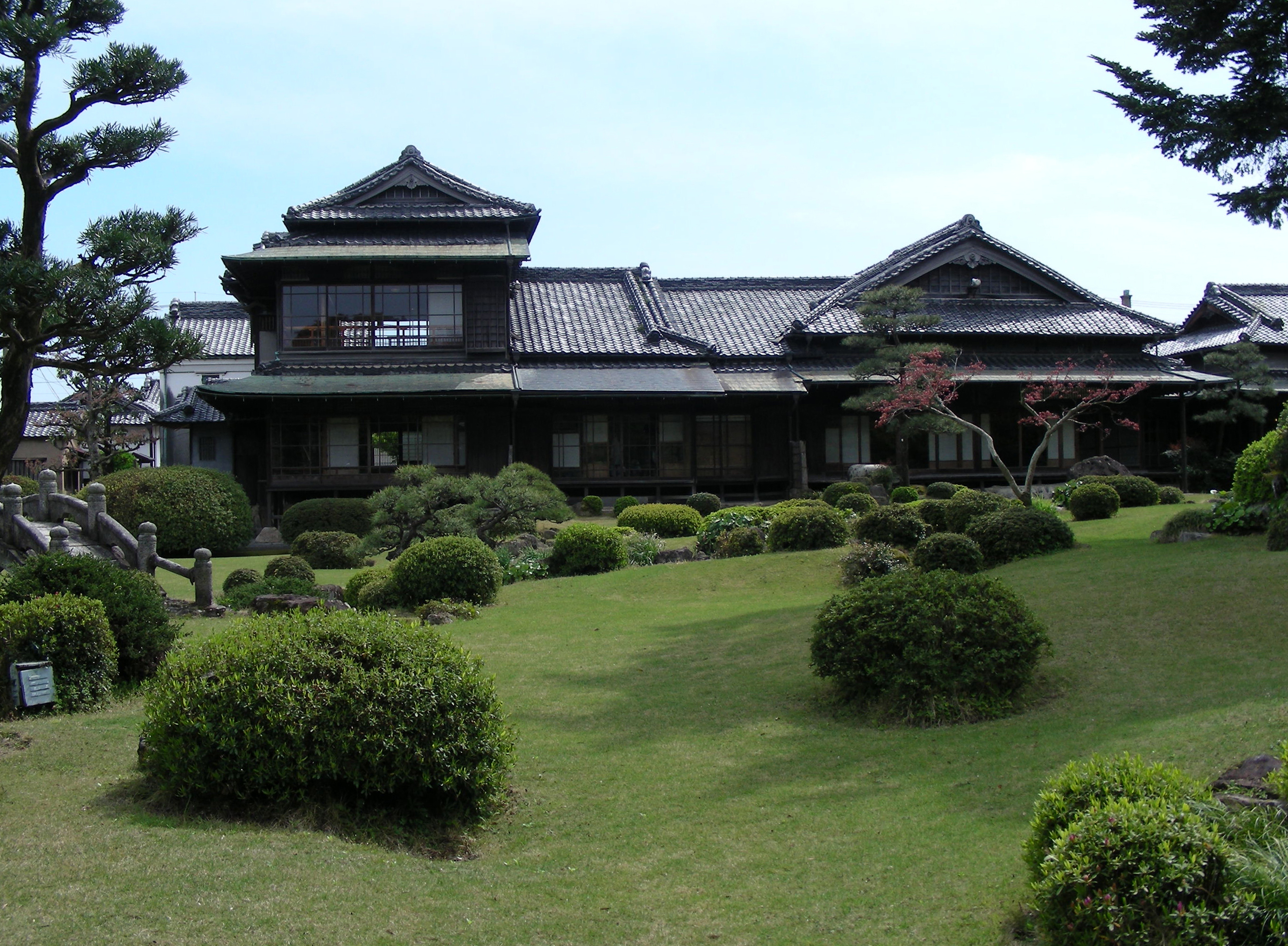 福岡県飯塚市幸袋の旧伊藤伝右衛門邸。2014年4月撮影。